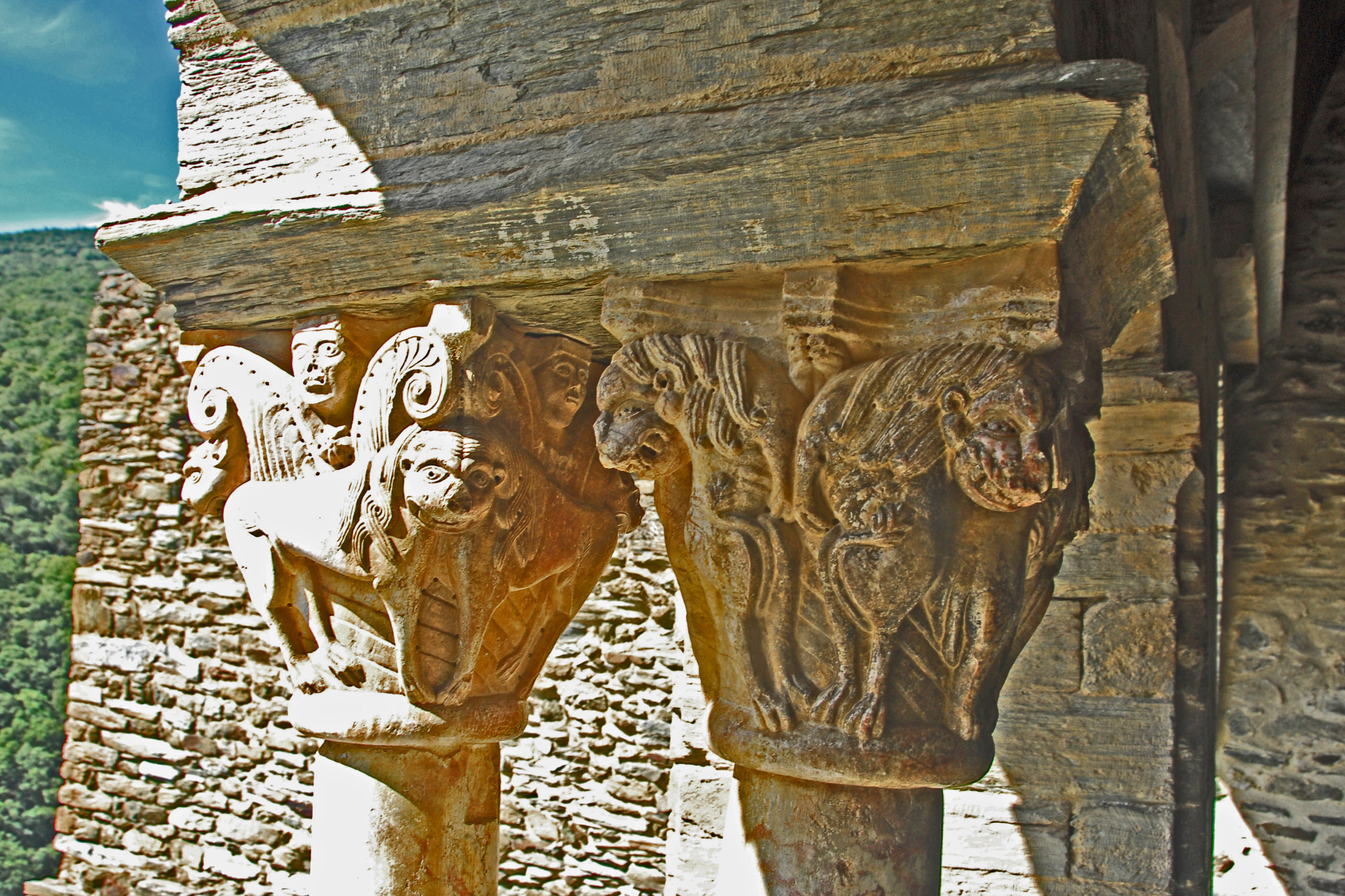 Serrabone, Kreuzgang, Kapitell Nr. 2+1